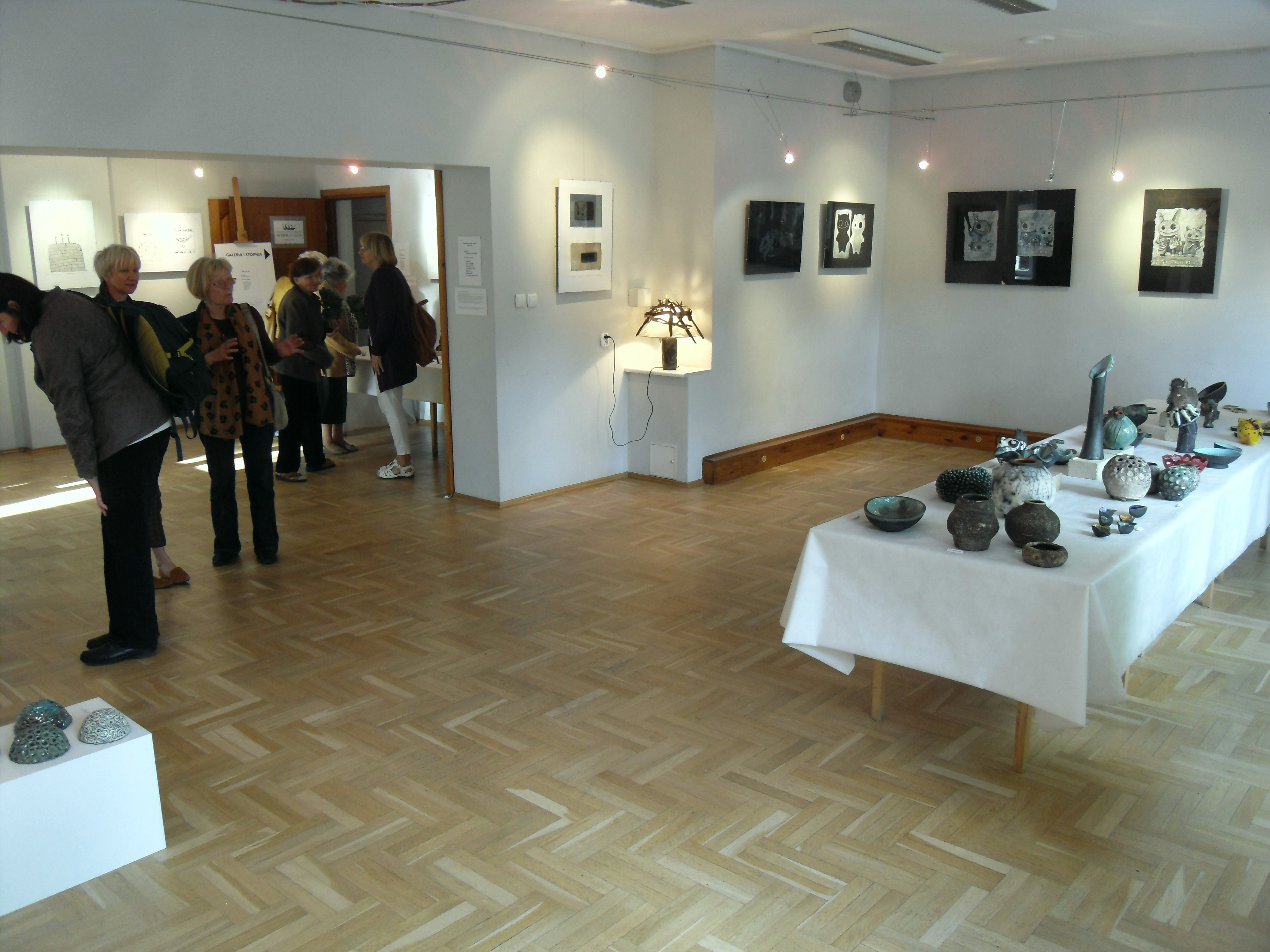 Gdańsk Sobieszewo, ul. Turystyczna 3. Galeria Gdańskiego Archipelagu Kultury (GAK) "Wyspa Skarbów".